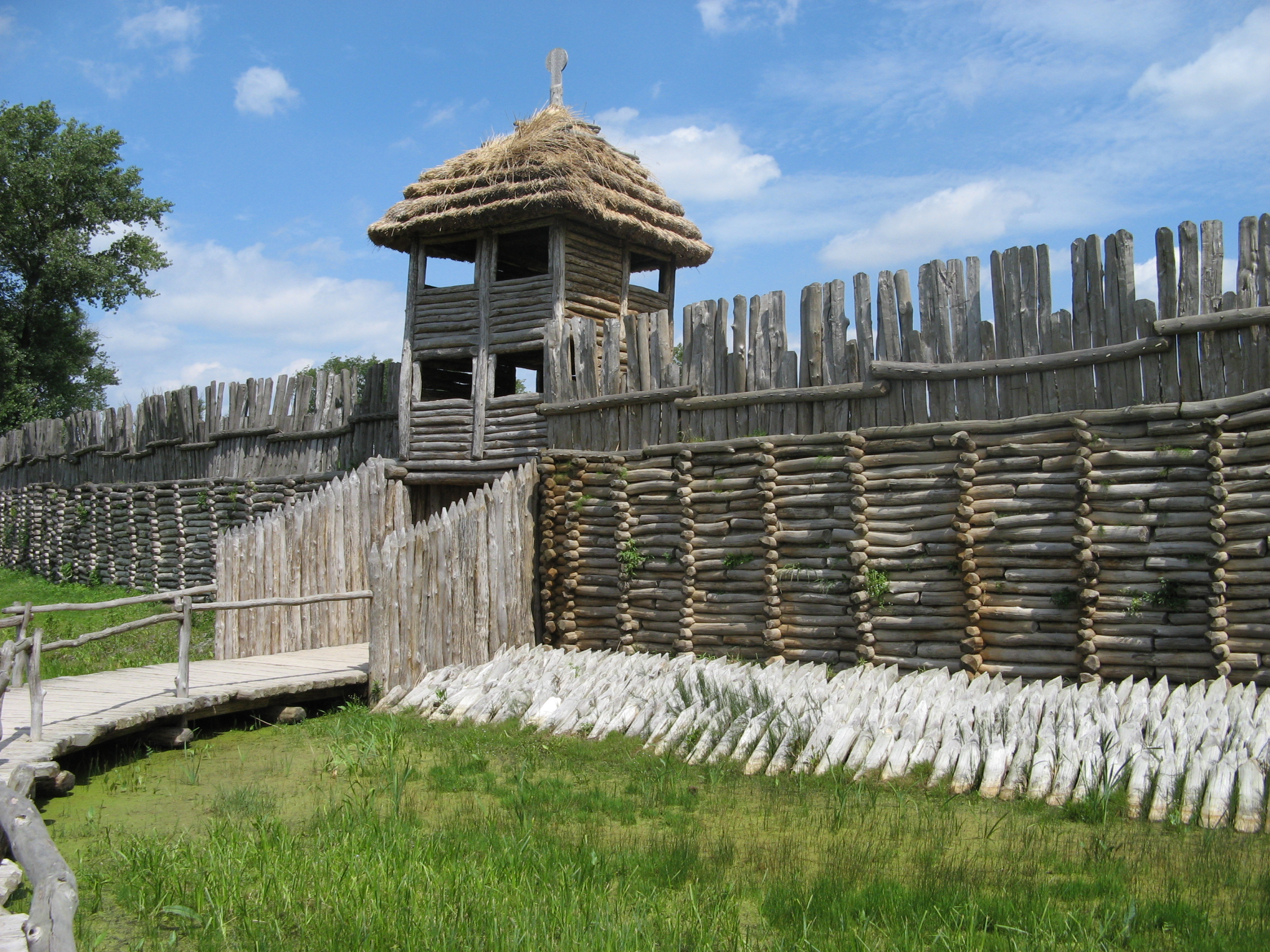 Biskupin - archeopark, rekonstrukce osady z doby bronzové. Brána od vnější strany.